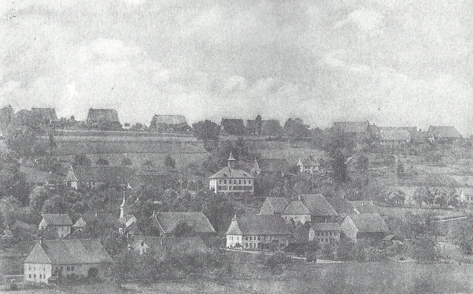 Vue générale de Denezy